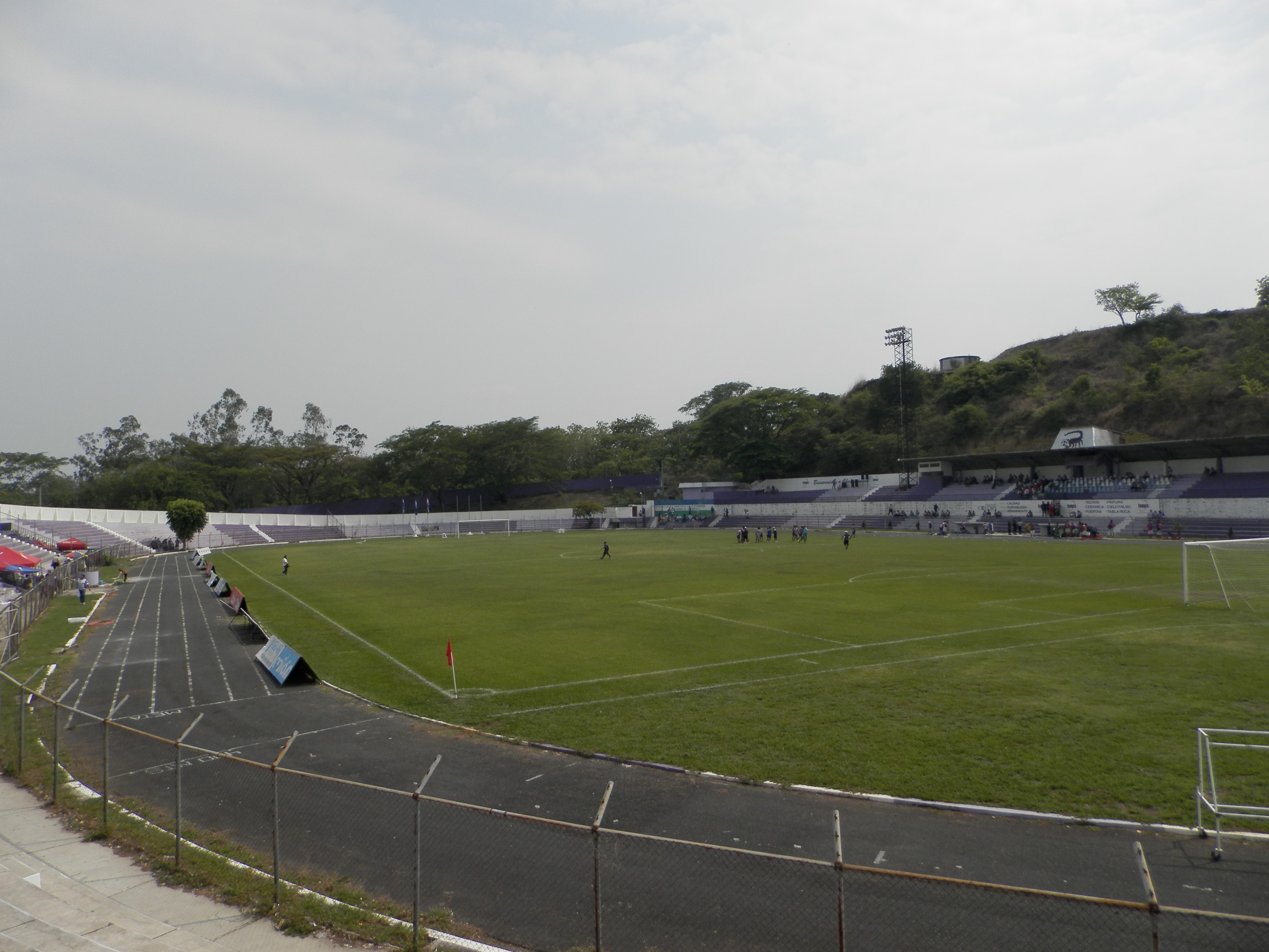 Panorama del estadio